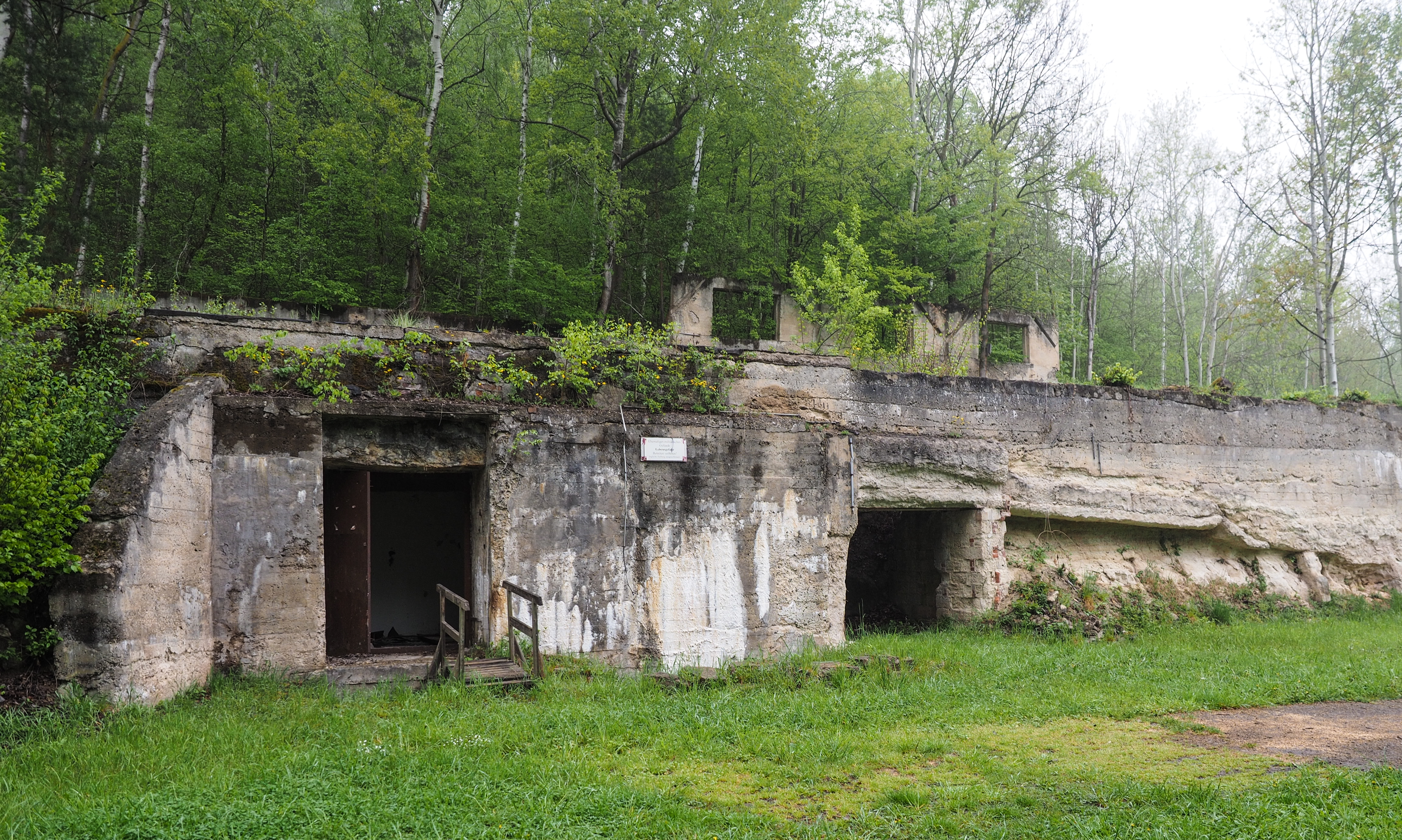 Ehemalige Rüstungsfabrik REIMAHG bei Kahla, Thüringen